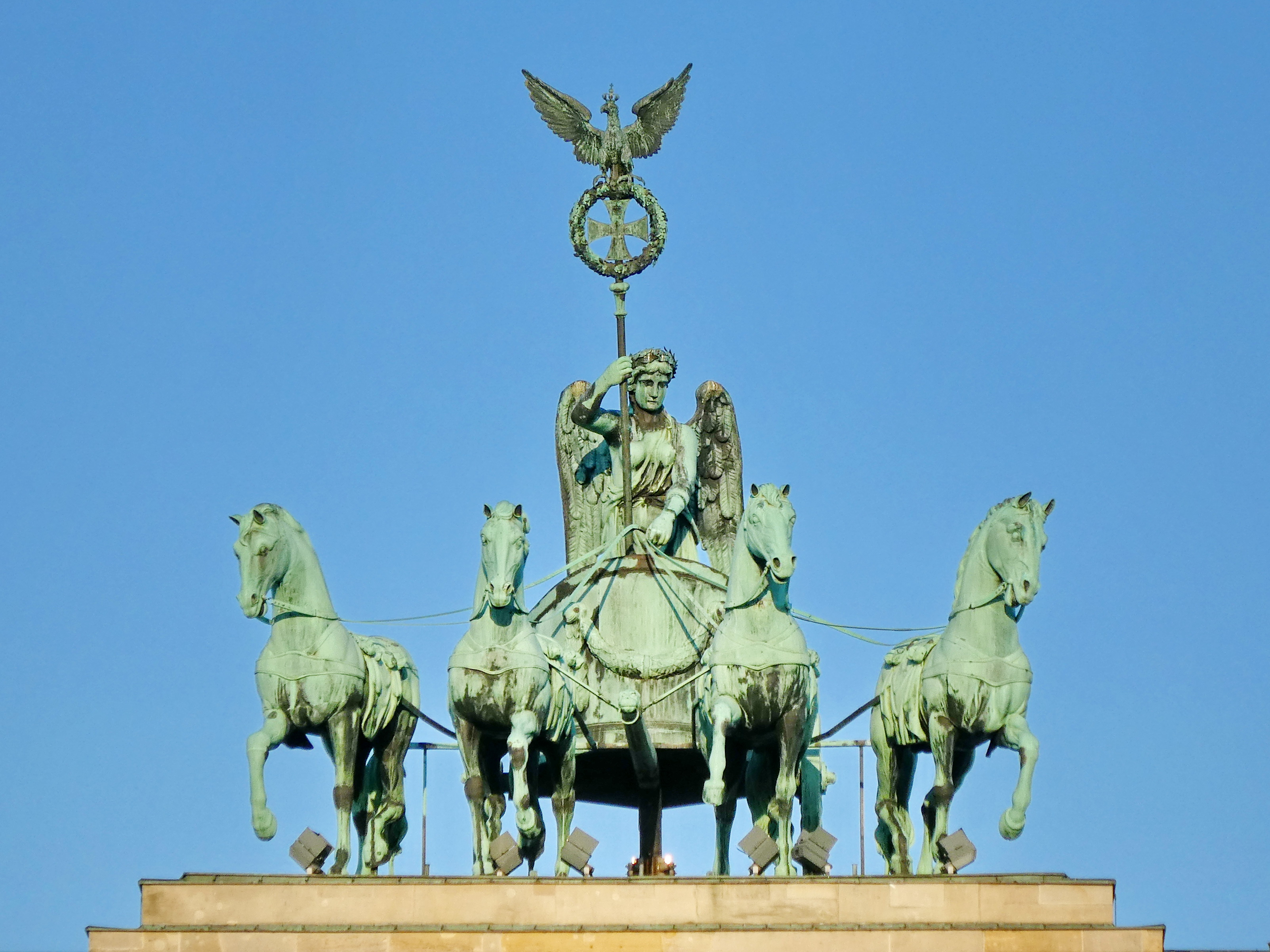 Quadriga on Brandenburg Gate in Berlin